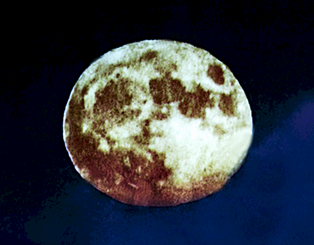 Vollmond über Unterschleißheim am 14.11.2016 bei einer Mondentfernung von rd. 356 000 km